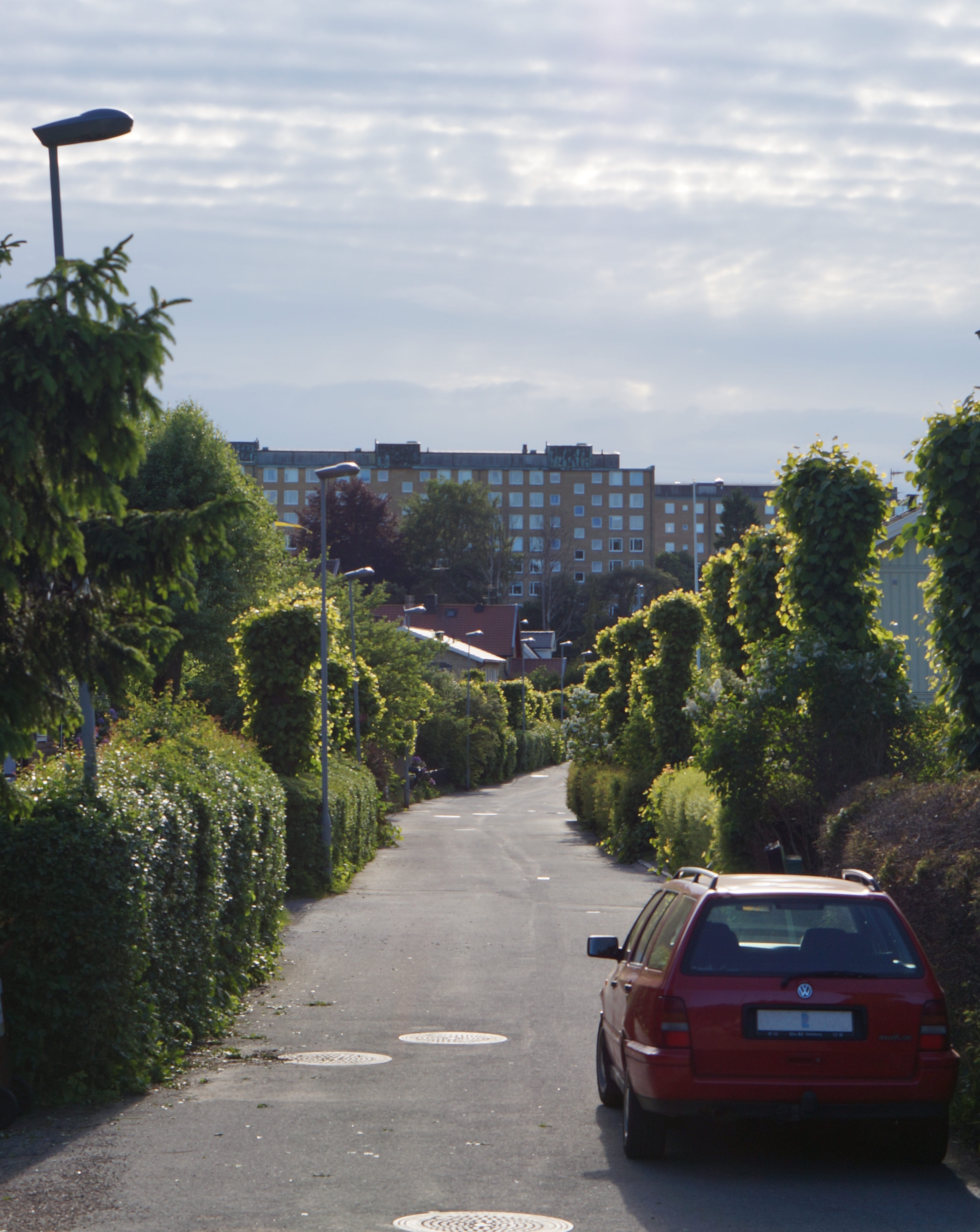 Frölundaborgs allè i rikting mot Marklandsgatan.